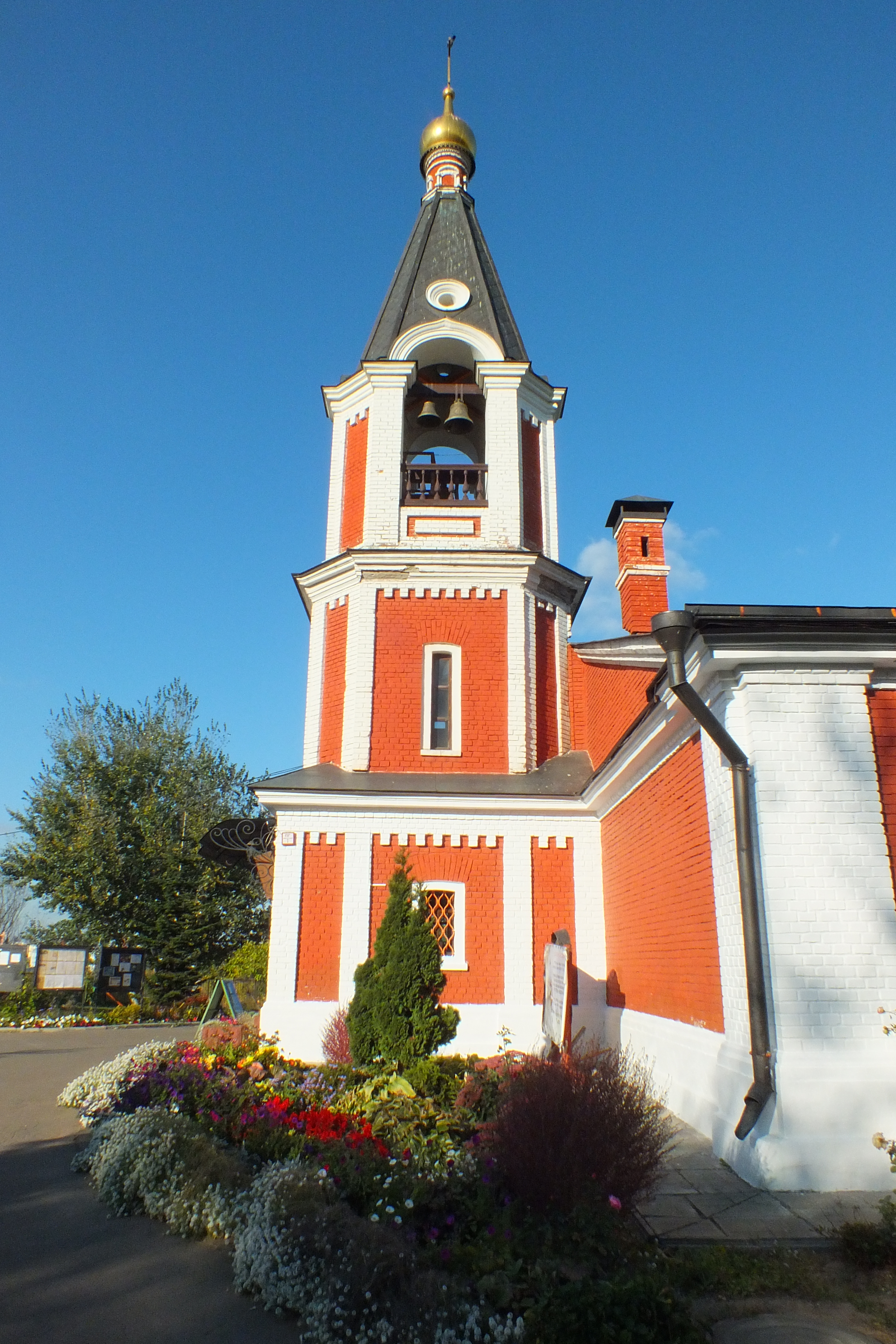 Церковь святителя Николая в Сабурове (Москва, Каширское шоссе, 59, корпус 4)